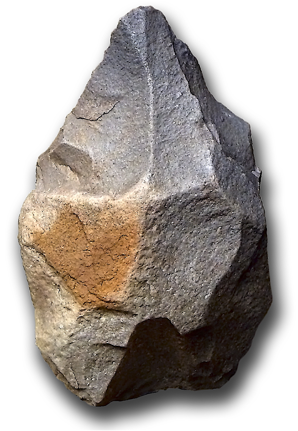 Protobifaz paleolítico procedente de la región del Sáhara atlántico Guelmim-Es Semara (Museo Arqueológico Nacional de Madrid)